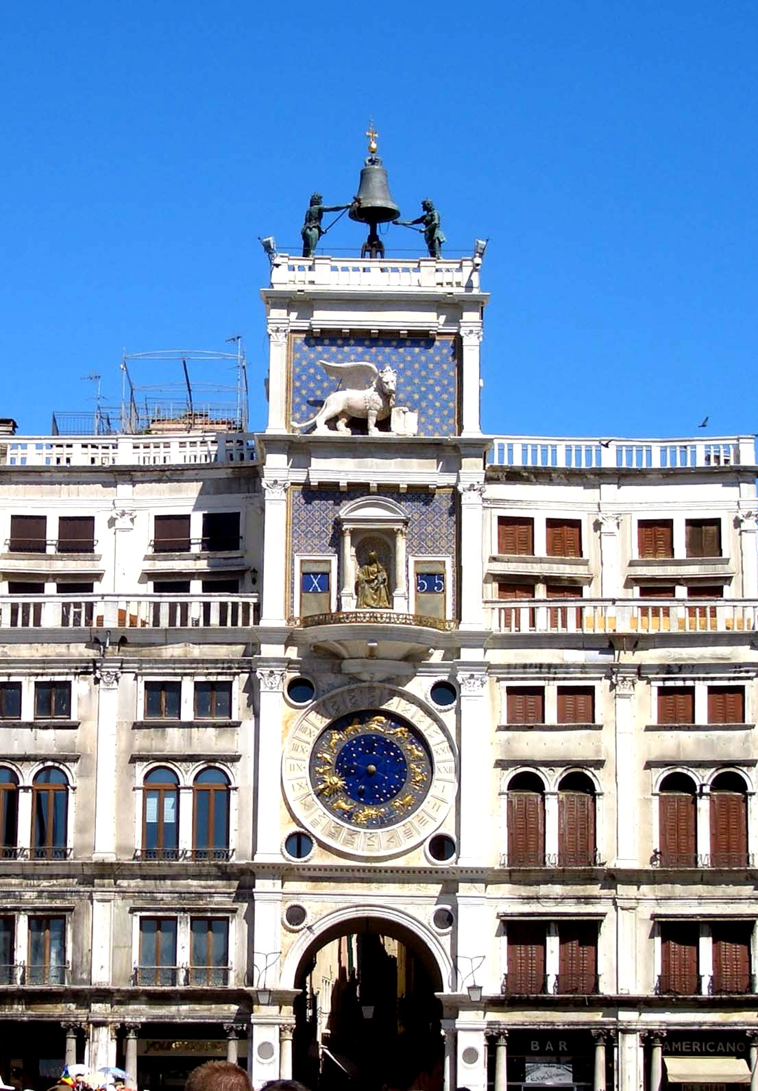 Torre_dell'orologio from venice. La foto è stata scattata da me a Venezia il 30.6.06 e rappresenta la Torre dell'orologio in Piazza San Marco, dopo il restauro iniziato nel 1997 e terminato il 27.5.2006.